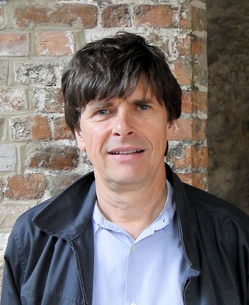 Architekt und Bühnenbildner Andreas Heller im Burgkloster in Lübeck.